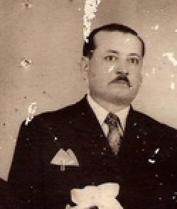 Fotografía del doctor Osvaldo Núñez